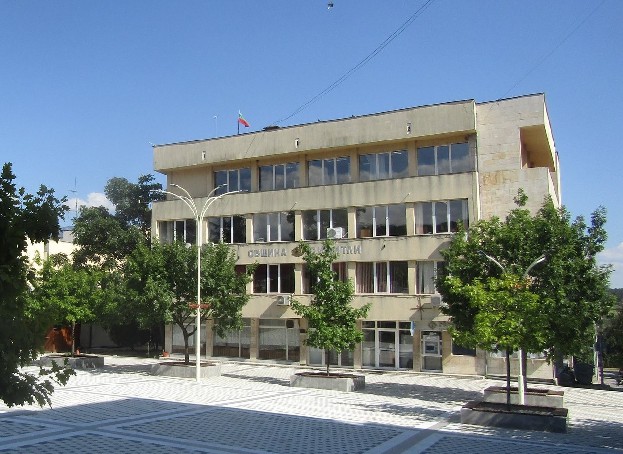 Сградата на общинския съвет през 2019 г.